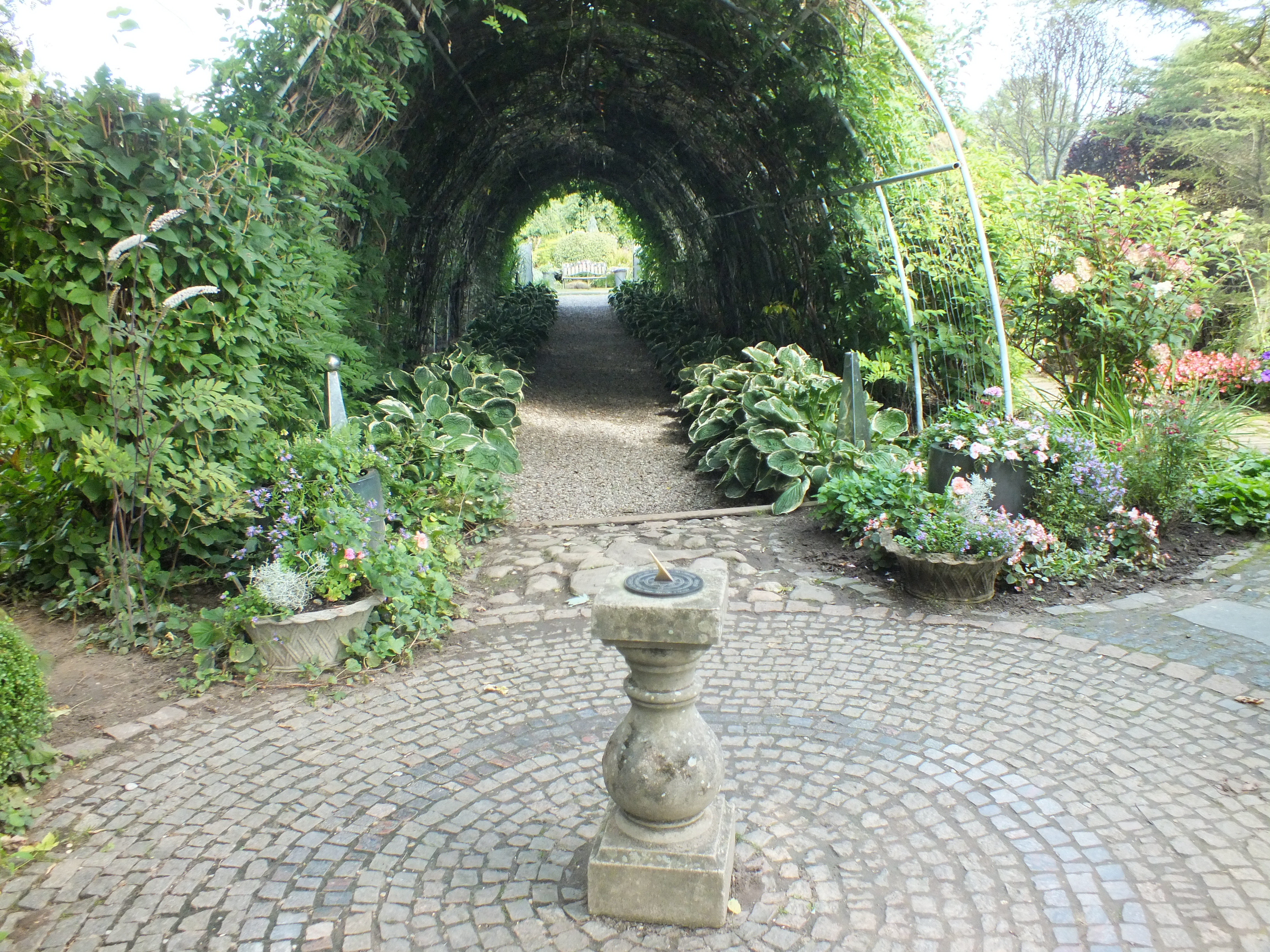 Dobrzyca, bindaż w Ogrodach Tematycznych Hortulus